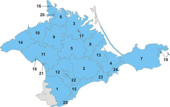 Административная карта-схема Республики Крым. С отмеченным Кировским районом